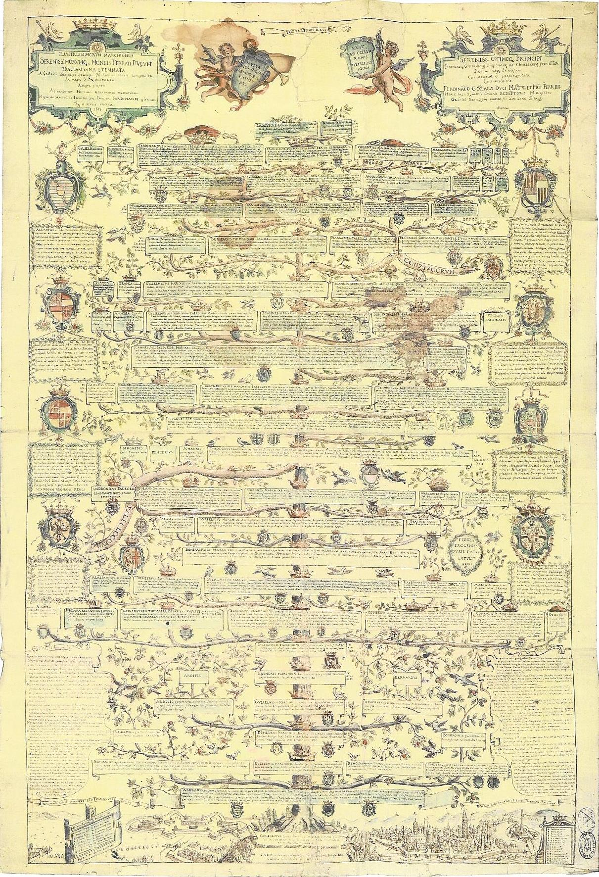 Albero genealogico della famiglia Gonzaga